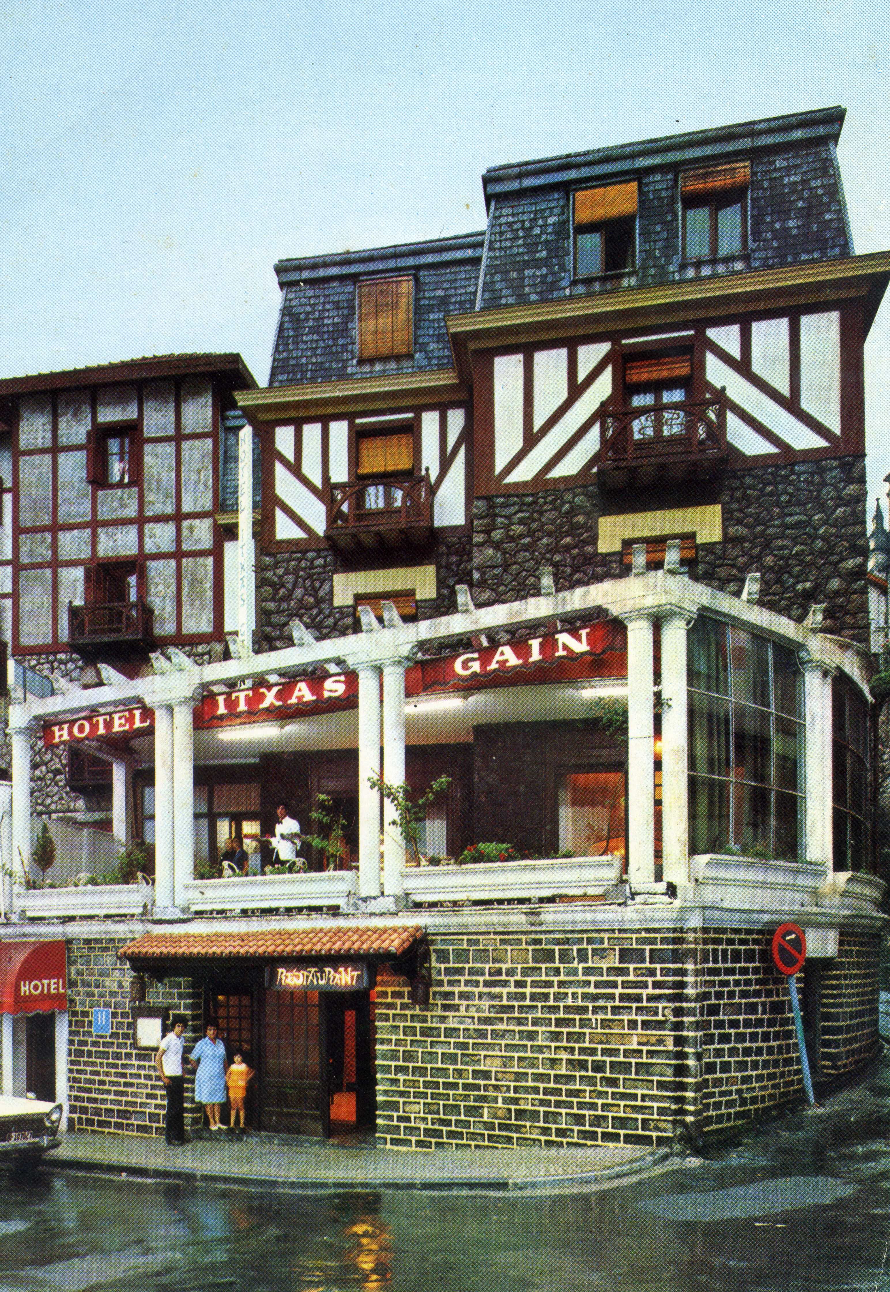 Hoteles en Miraconcha años 70